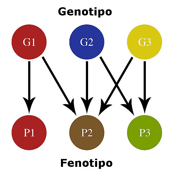 Schema semplificato dei rapporti tra genitipo e fenotipo